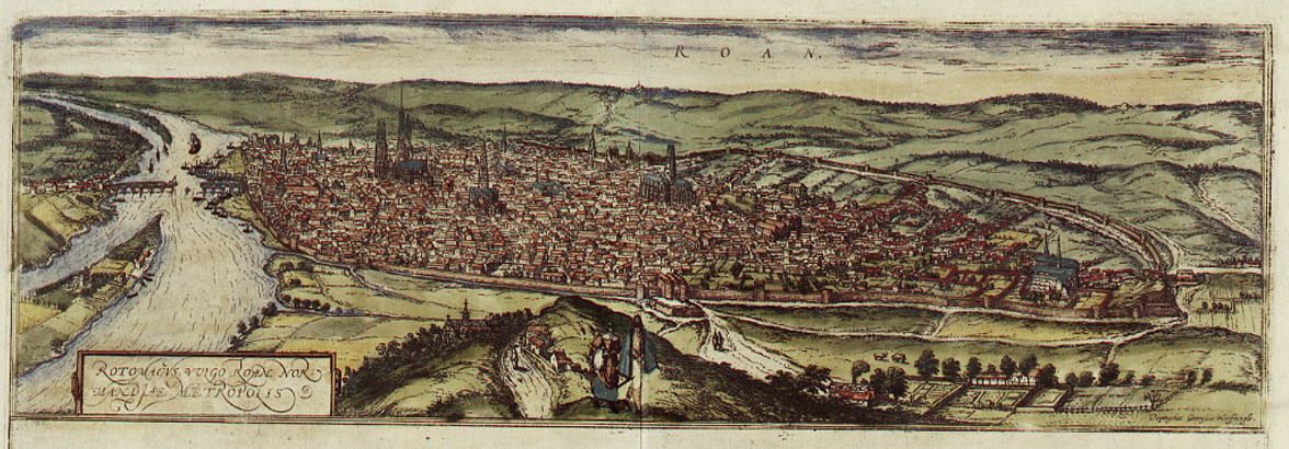 Rouen